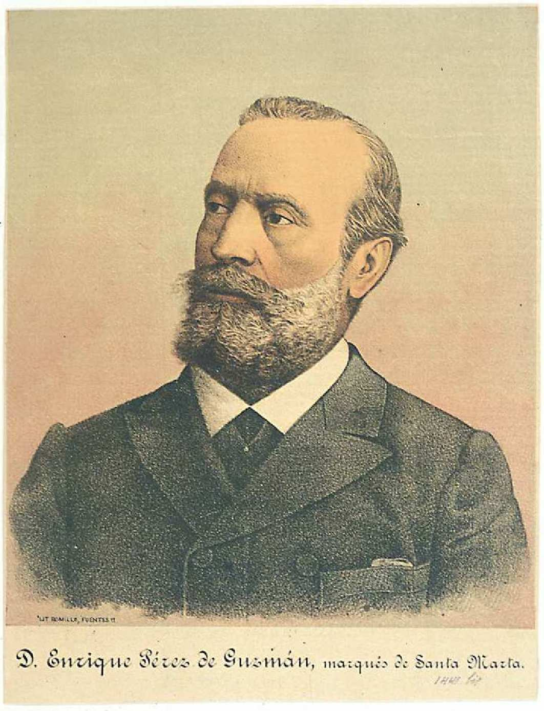 Enrique Pérez de Guzmán, marqués de Santa Marta, cromolitografía de Lit. Romillo para El Motín, periódico semanal. Madrid. 1891. Biblioteca Nacional de España.